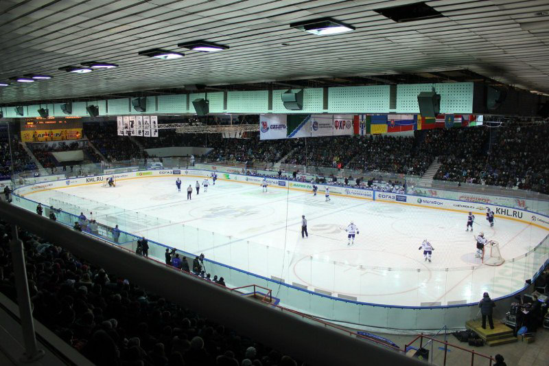 ЛДС "Сибирь"